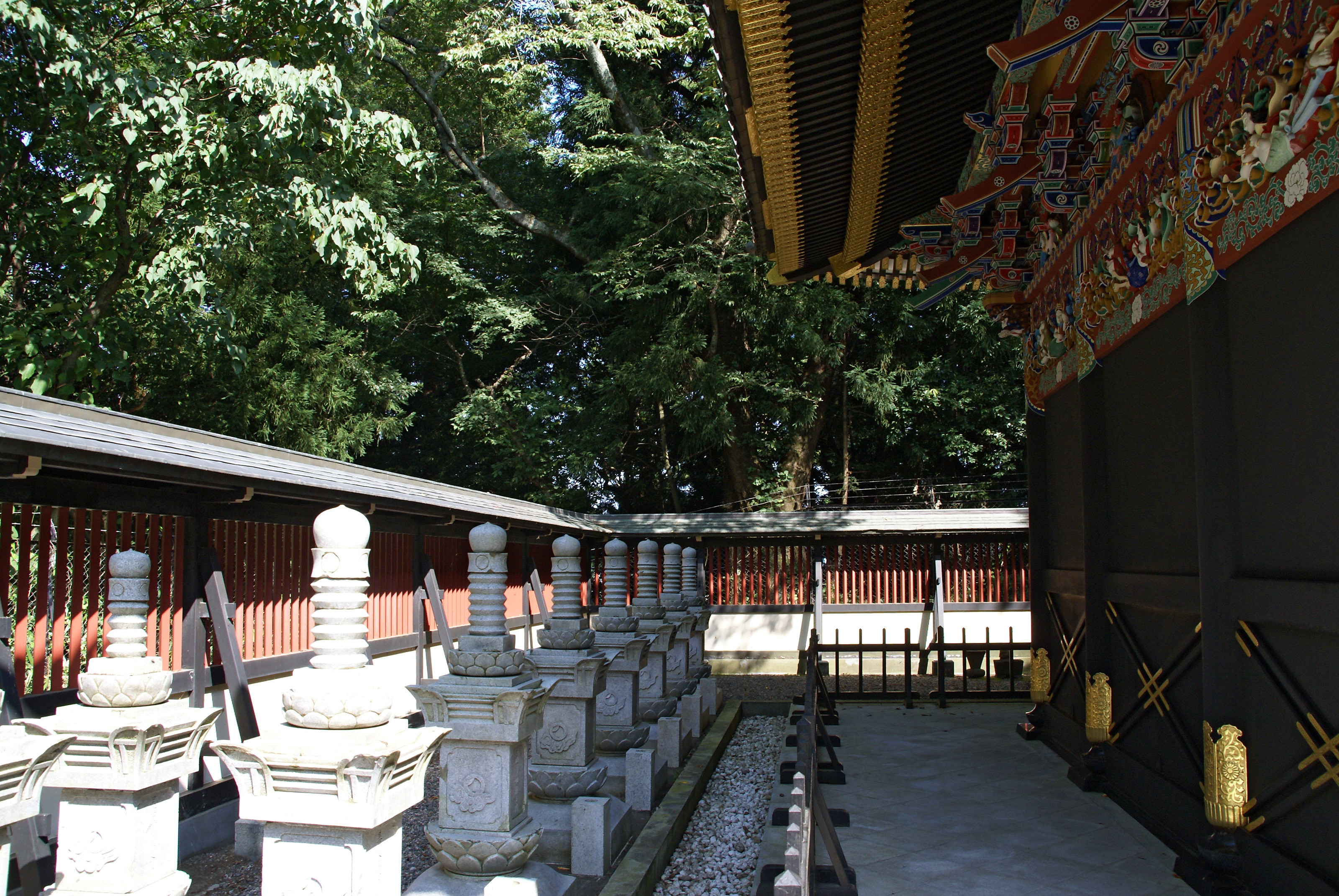 Zuiho-den in Sendai, Miyagi prefecture, Japan